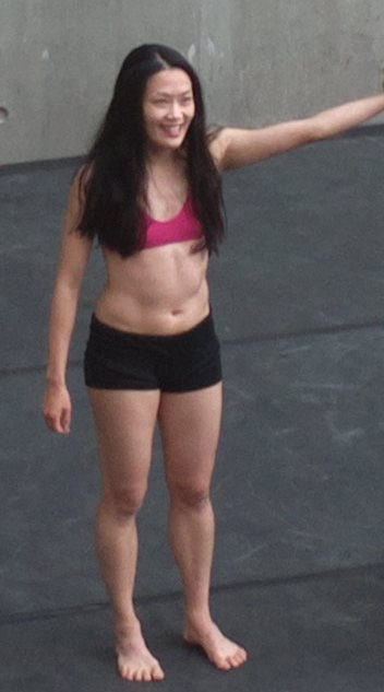 Kaori Ito, en 2014.